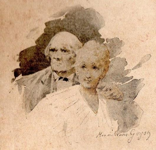 Illustration de la couverture de Yan (Jean Rameau, Paul Ollendorff éditions) par Maximilienne Guyon.